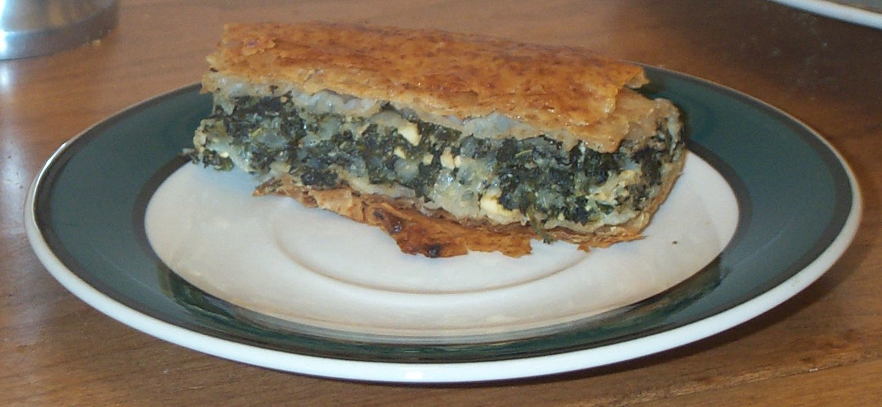 spanokopitaspanokopita